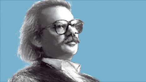 الشاعر أنسي الحاج